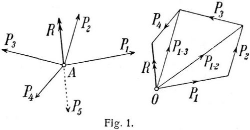 Kräftepolygon